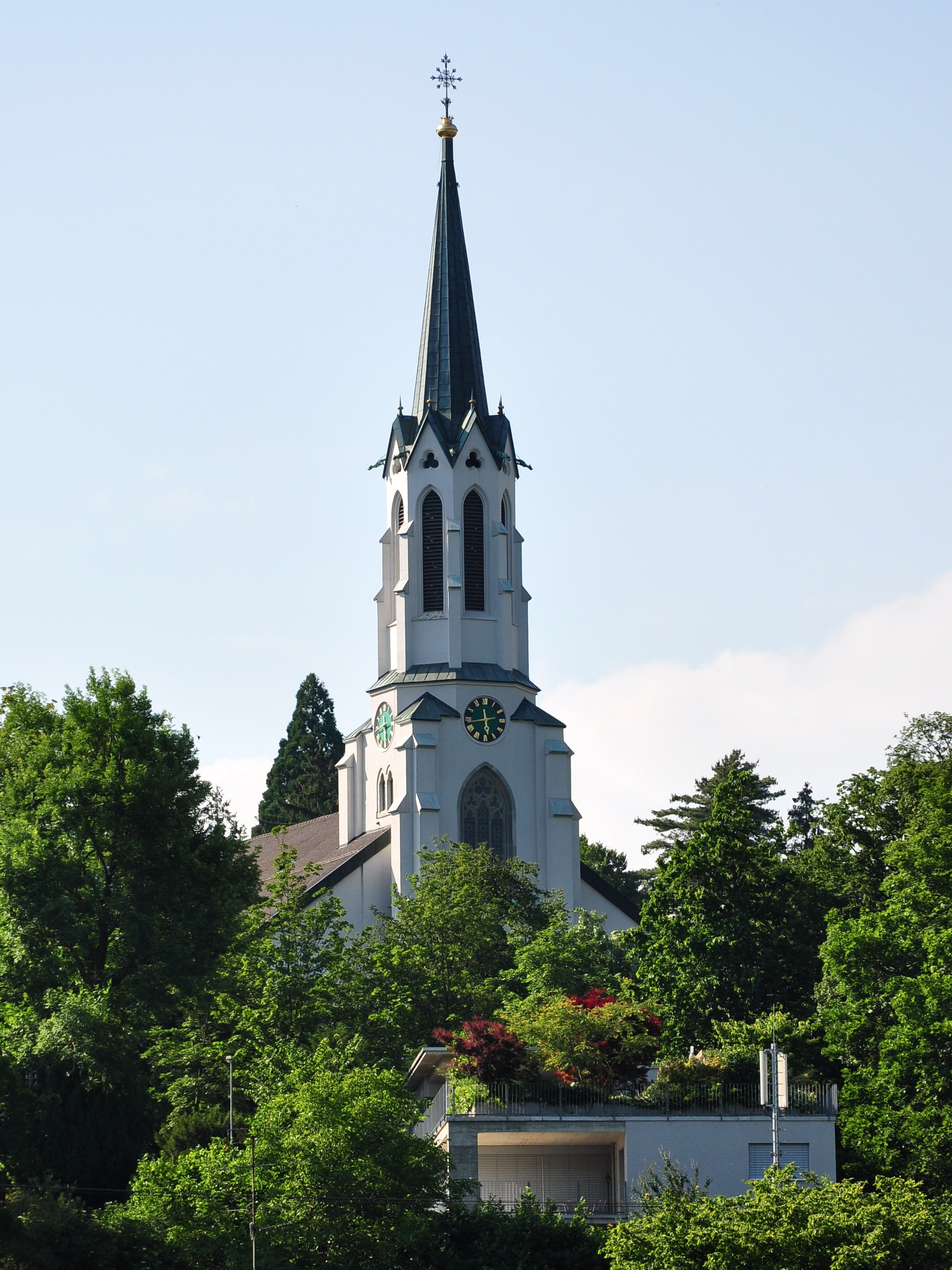 Schaffhausen and Rhein as seen from Feuerthalen (Switzerland)